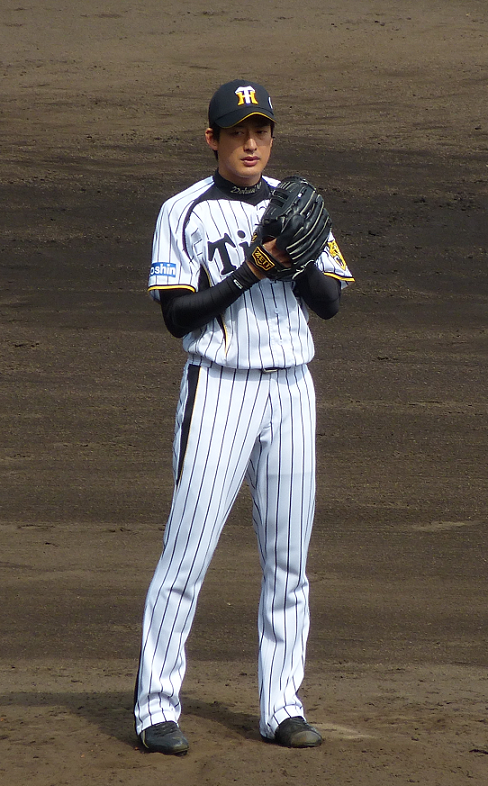 阪神甲子園球場にて撮影。